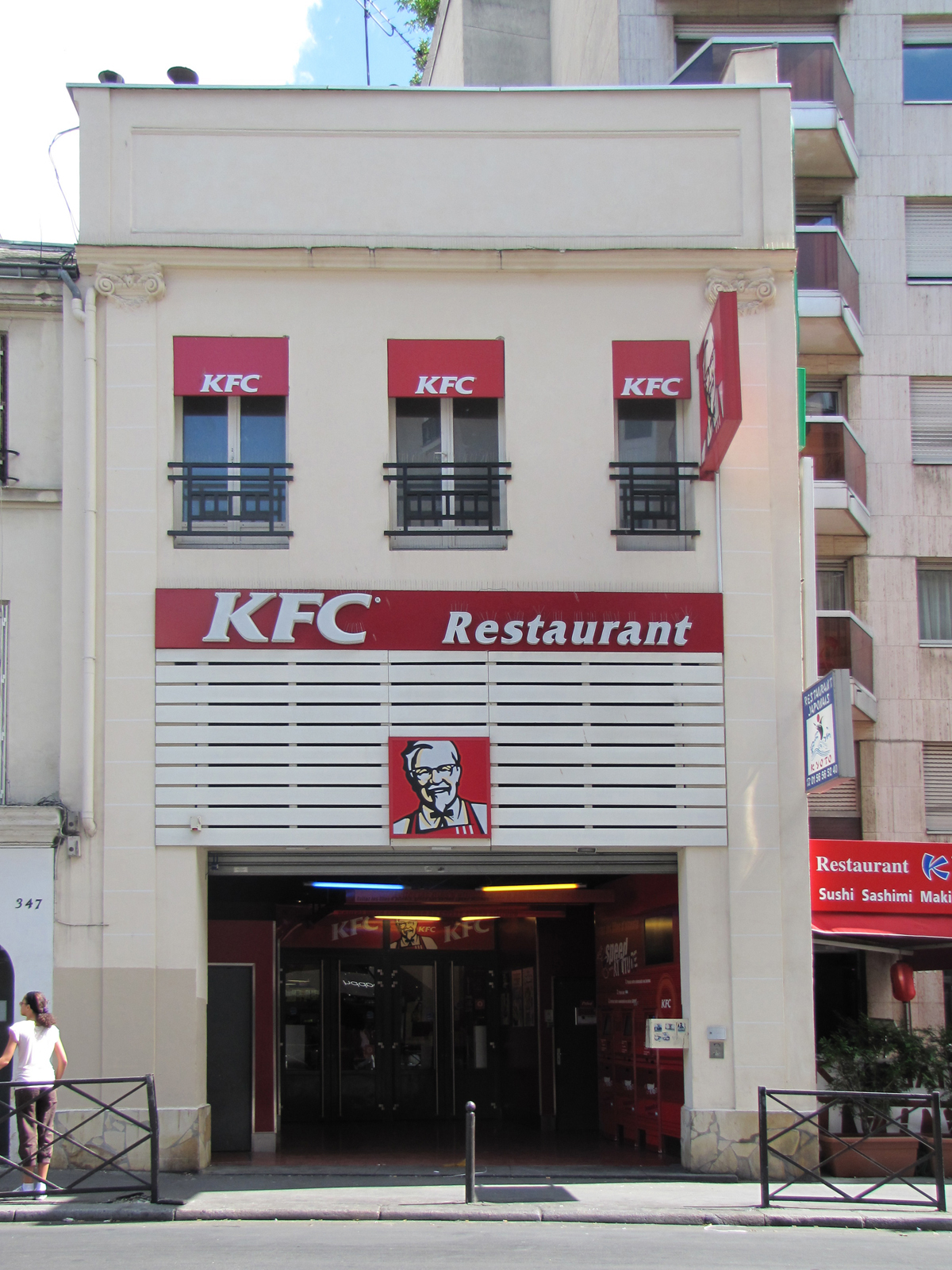 Ancien cinéma de quartier, 349 rue de Vaugirard, Paris 15